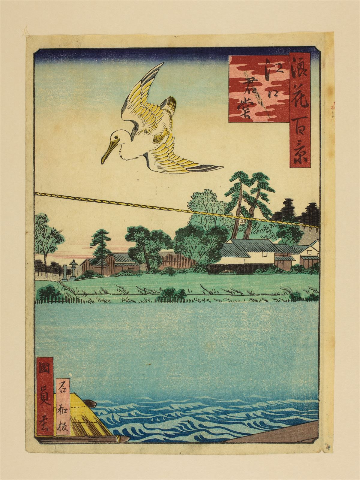 1800年代。歌川國員/画。浪花百景 102枚のうちの1枚。大阪市立中央図書館蔵。